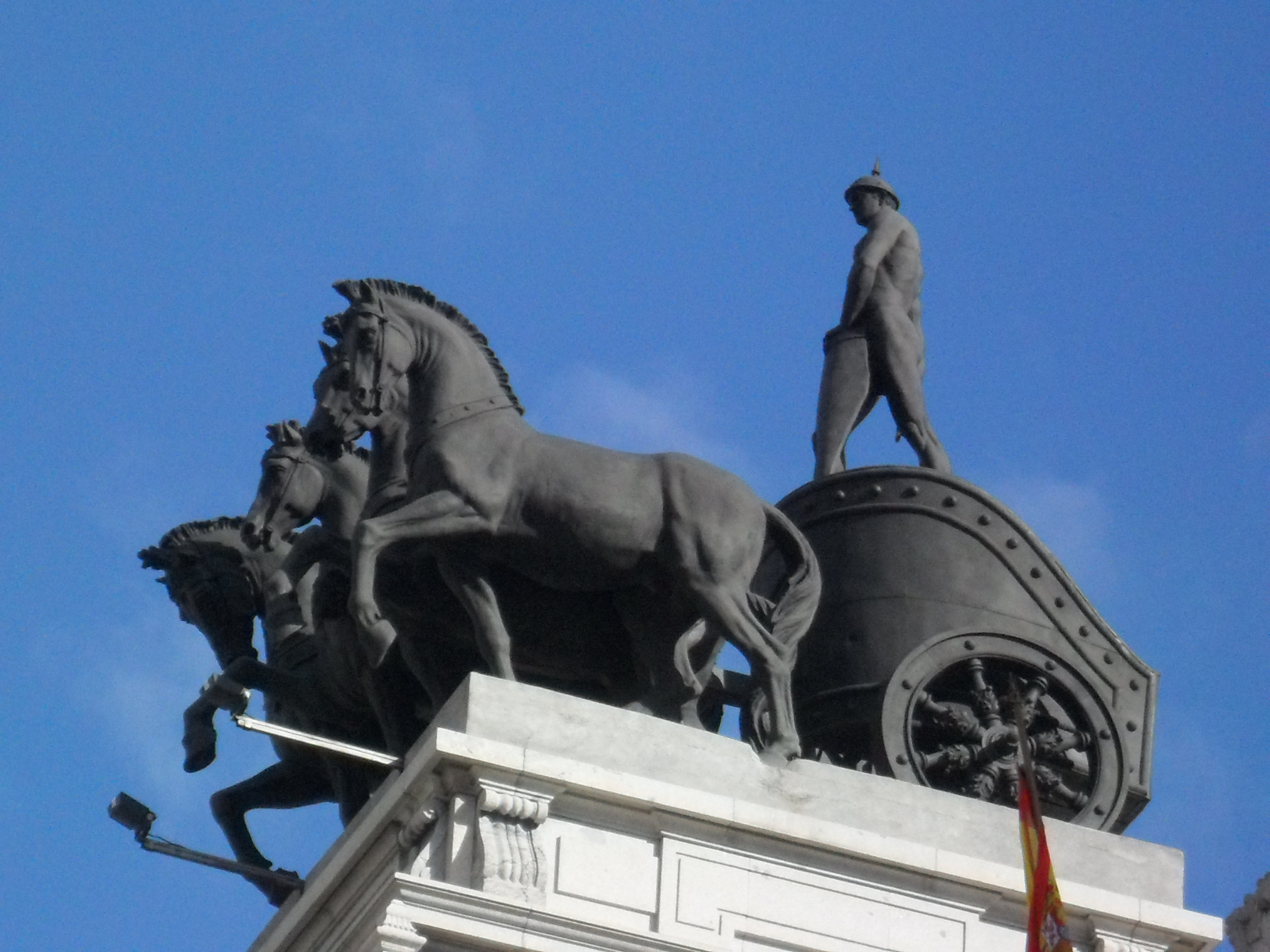 pormenoor de edificio